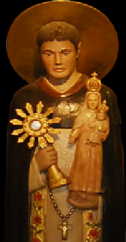 Straszyn - rzymskokatolicki kościół parafialny p.w. św. Jacka Odrowąża (figura św. Jacka Odrowąża)